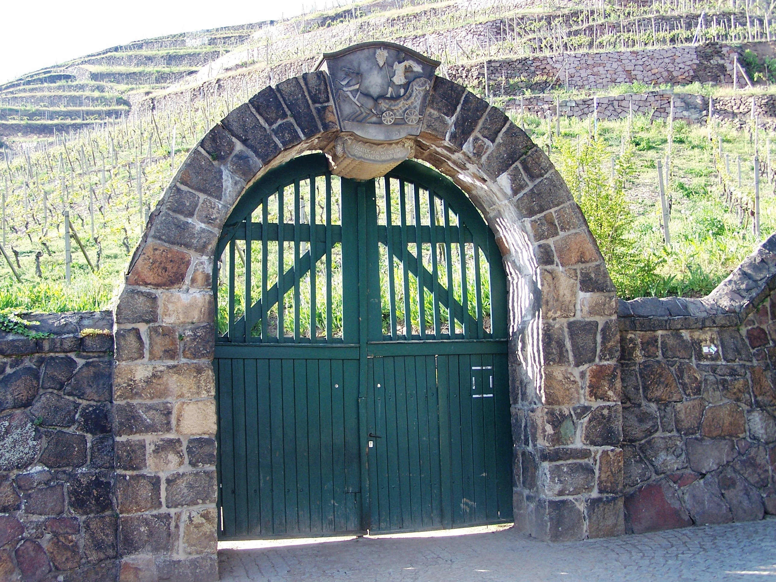 Eingang zum Weinberg "Goldener Wagen" in Radebeul